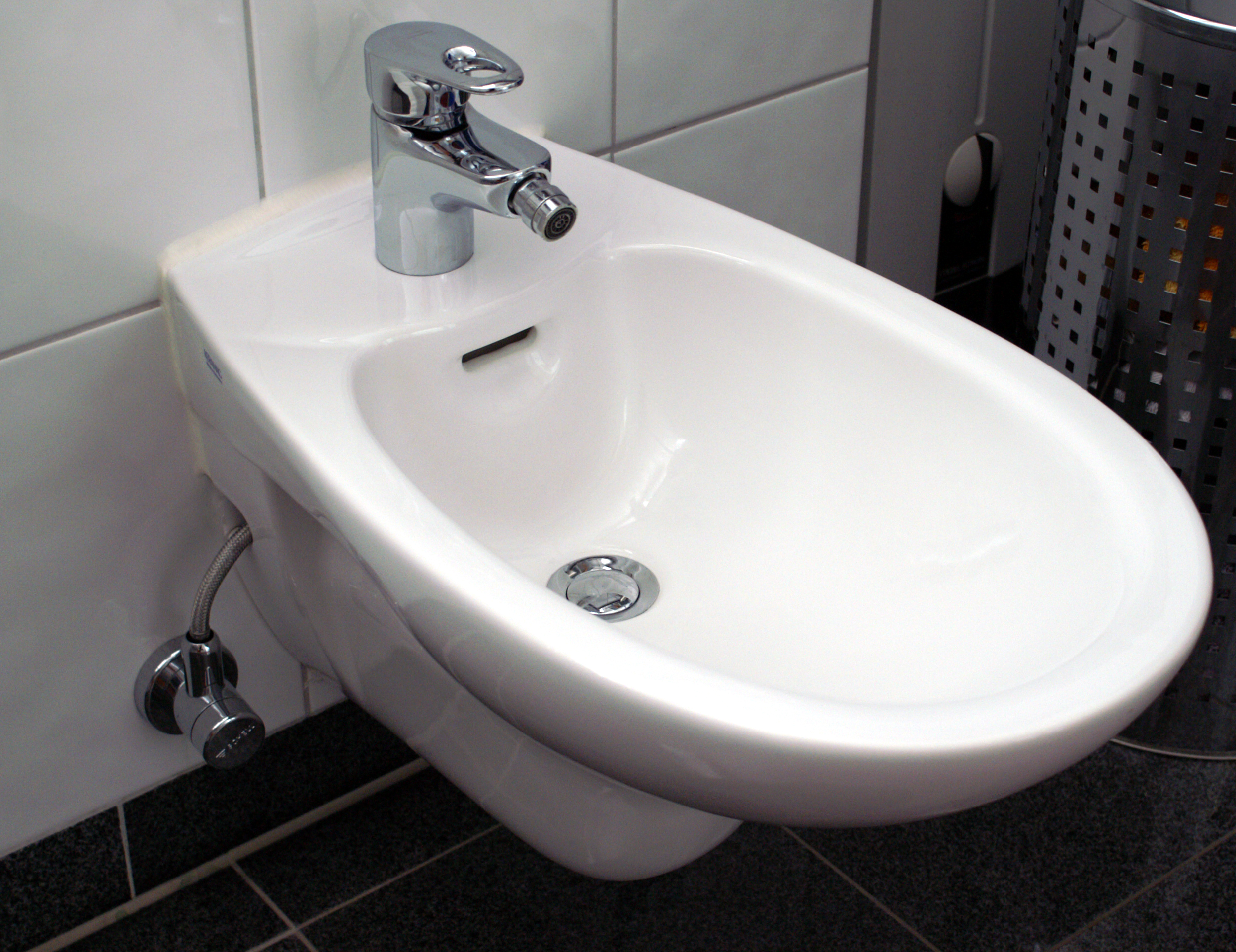 Bildbeschreibung: Bidet weiss Quelle: selbst fotografiert Fotograf/Zeichner: Sebastian Schlüter Datum: 18.7.2006